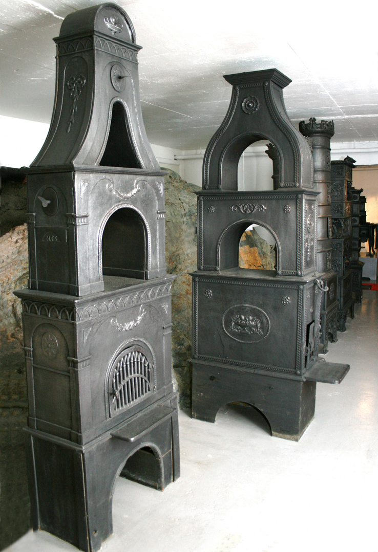 Fra Aust-Agder-Museets ovnsutstilling. Næs Jernverks modell Kentaur nærmest. Tilhører Aust-Agder kulturhistoriske senter